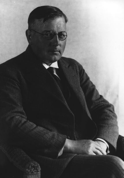 Føroyskt: Mads Andreas Jacobsen (1891–1944), rithøvundur, lærari, bókavørður á Færø Amtsbibliotek, borgarstjóri í Havn og løgtingsmaður.